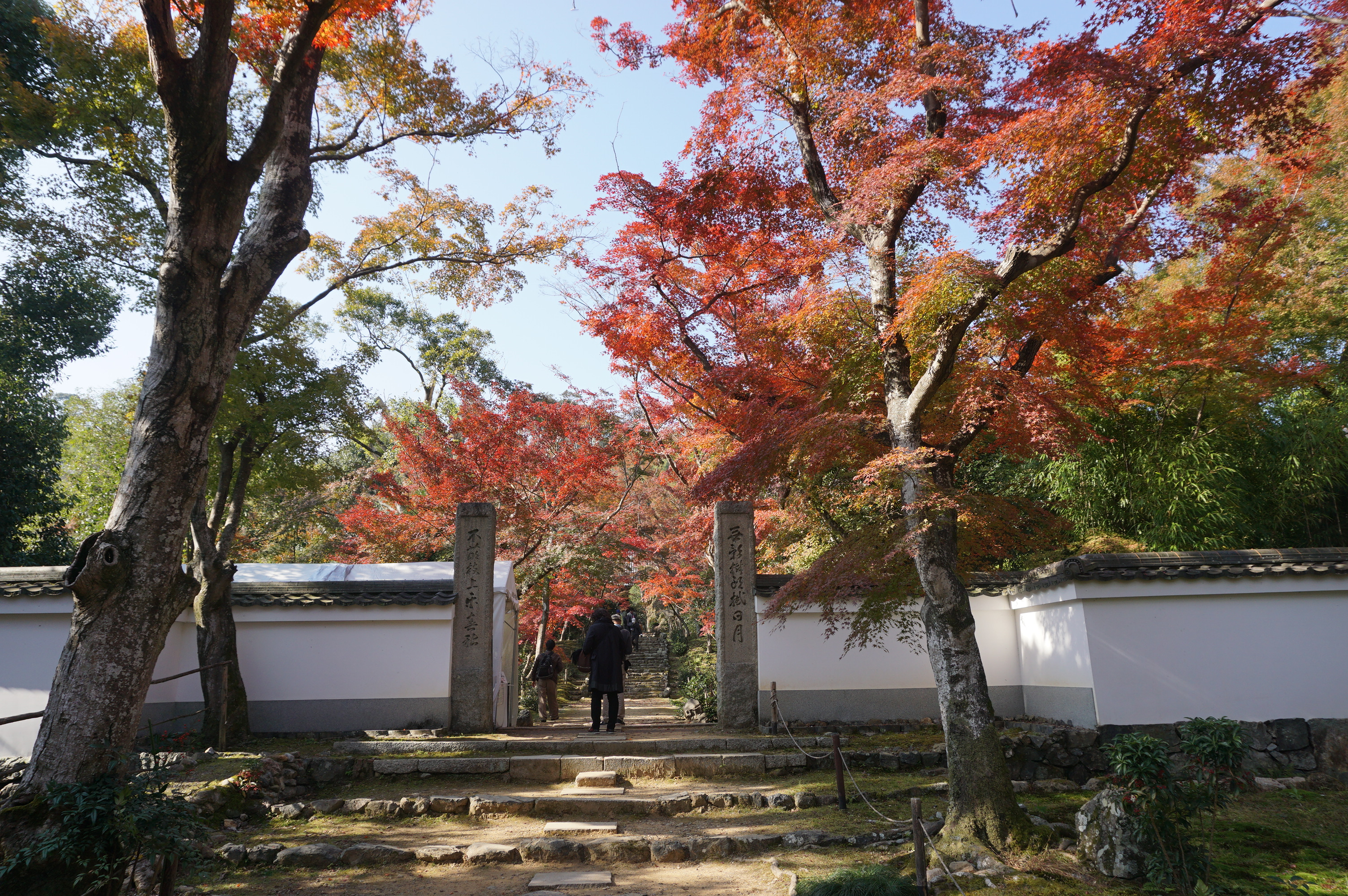 浄住寺の入口 Sony ILCE-6000